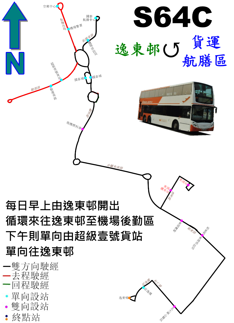 中文（香港）: 龍運巴士S64C線的走線圖